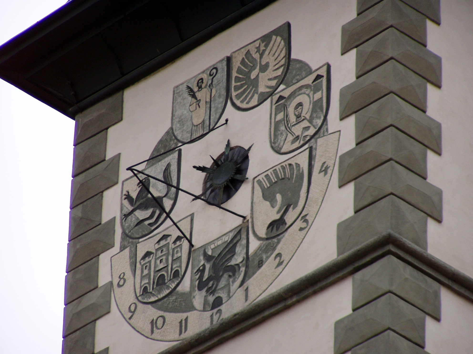 Sonnenuhr am Nordturm des Landhauses von Werner Lösser, Klagenfurt